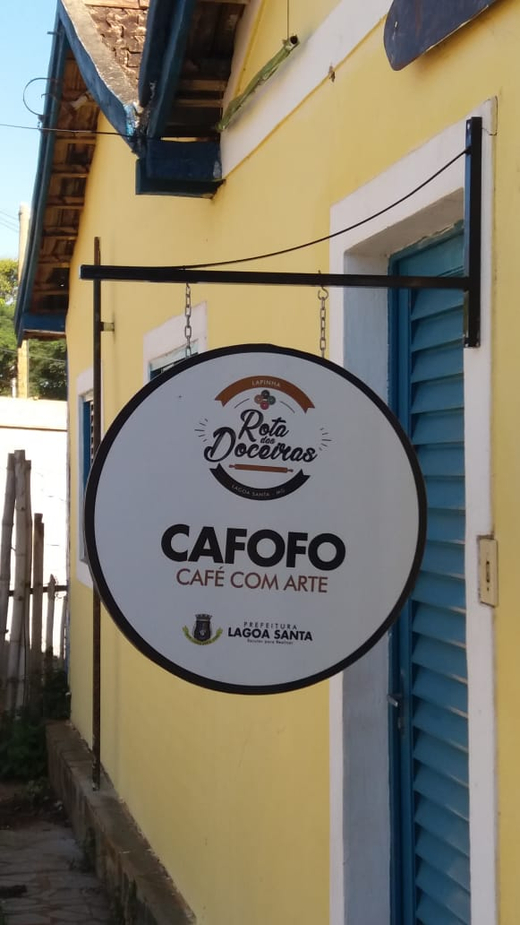 Um dos pontos de visita disponíveis na Rota das Doceiras